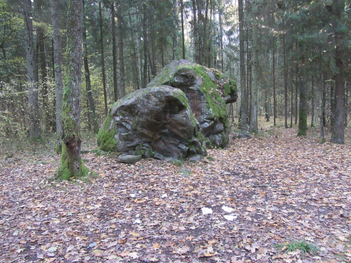 Стары Альбярцін. Камень-следавік This is a photo of Belarusian heritage monument. Reference number: 413В000520 ( WLM)